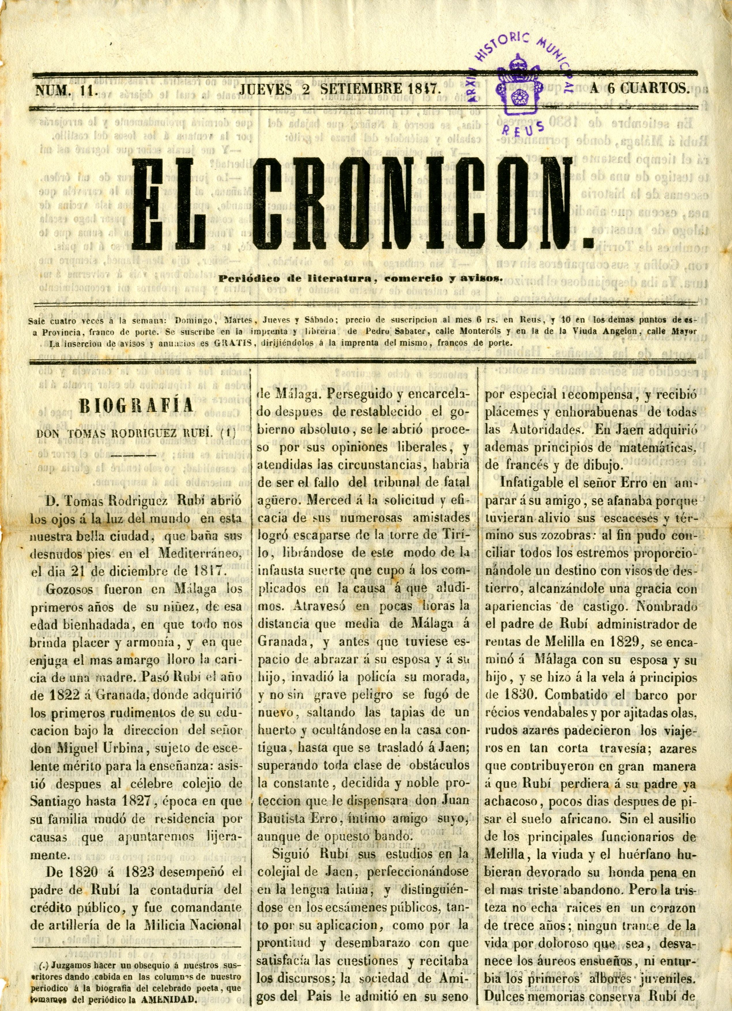 Primera pàgina del núm. 11 de El Cronicón